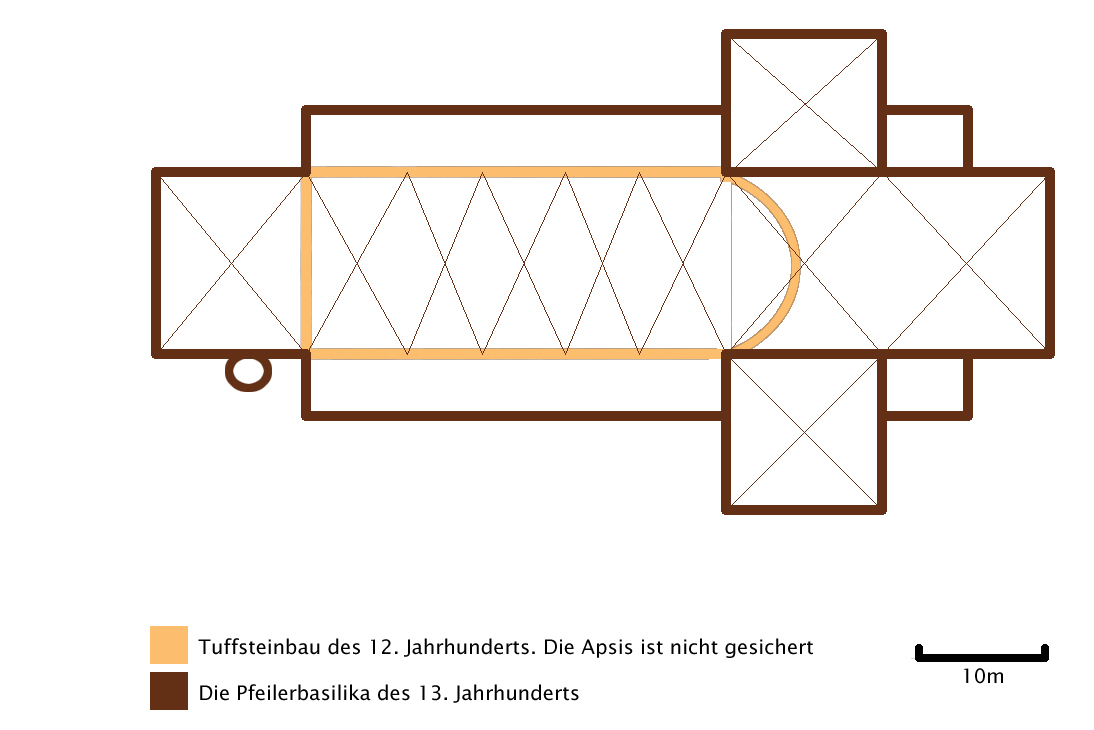 Rekonstruktionszeichnung der Andreaskirche nach einer Vorlage aus dem Ostfriesisches Teemuseum Norden (mit angegliedertem Heimatmuseum).